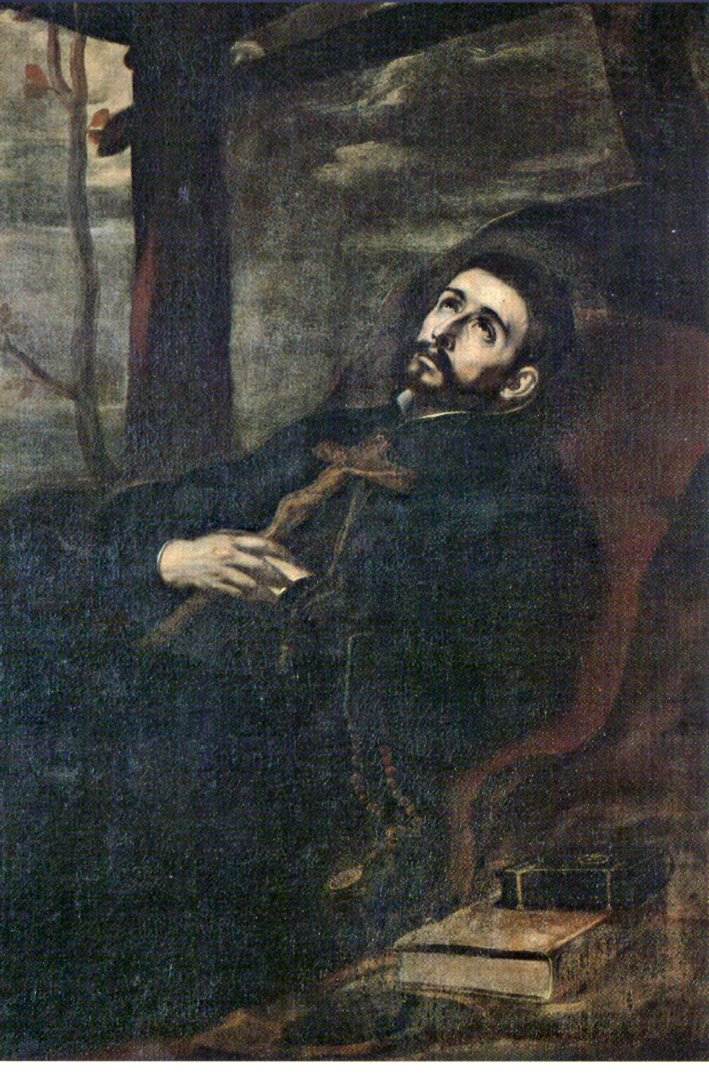 La obra representa la muerte del religioso jesuita San Francisco Javier.